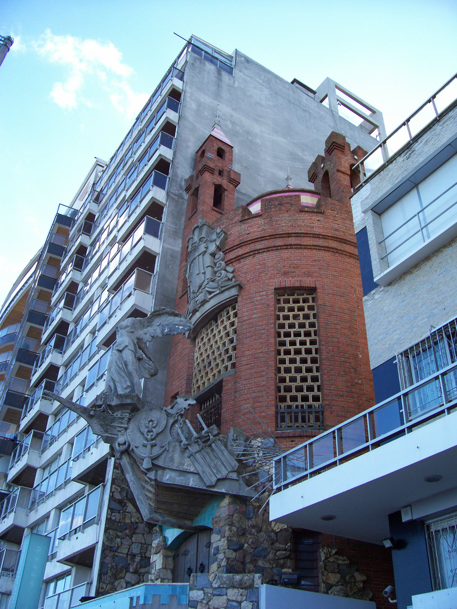 Fachada del castillo Pittamiglio en la rambla montevideana, marzo de 2006. Tomada por Federico Corral aka Shant